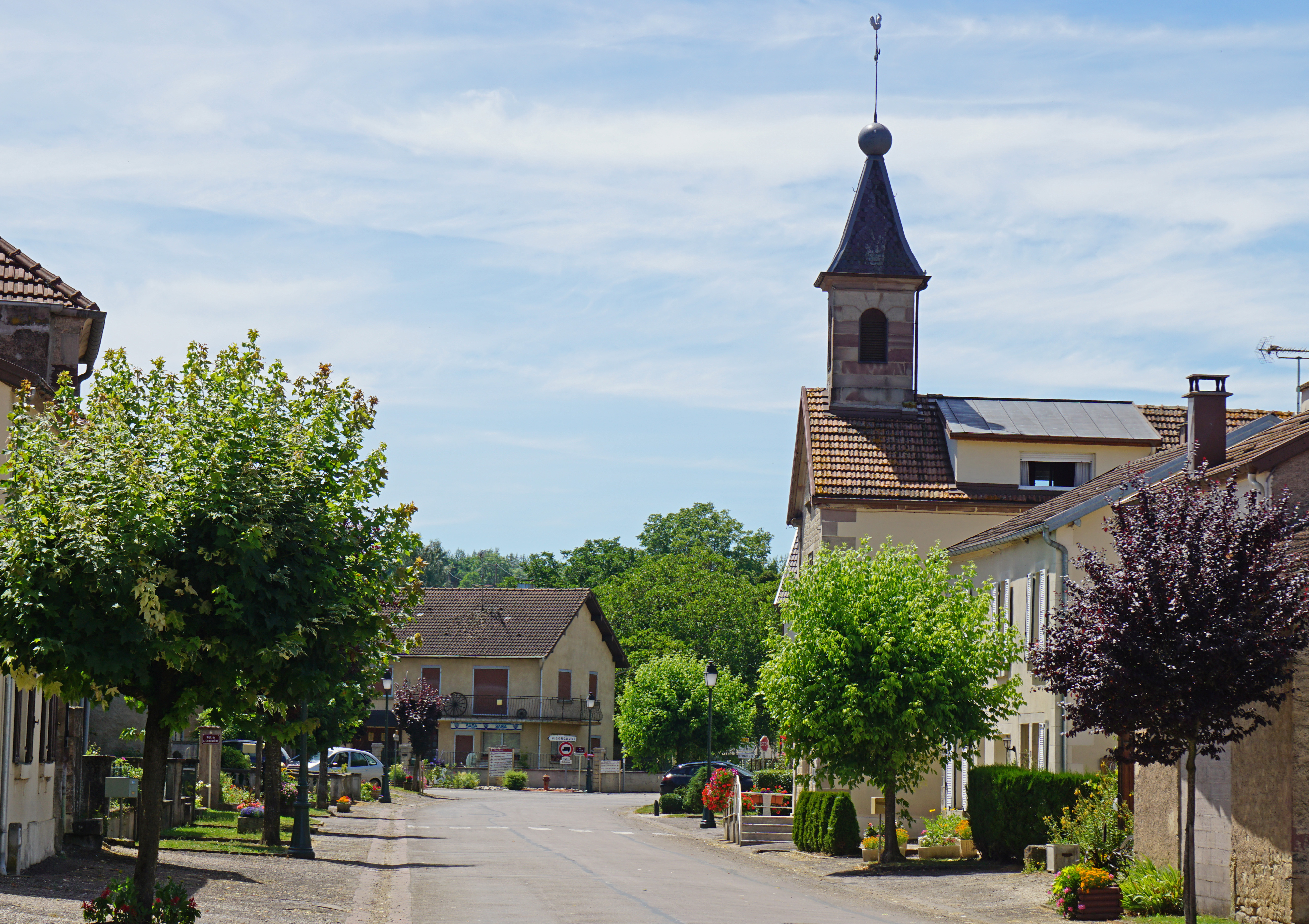 Éhuns.